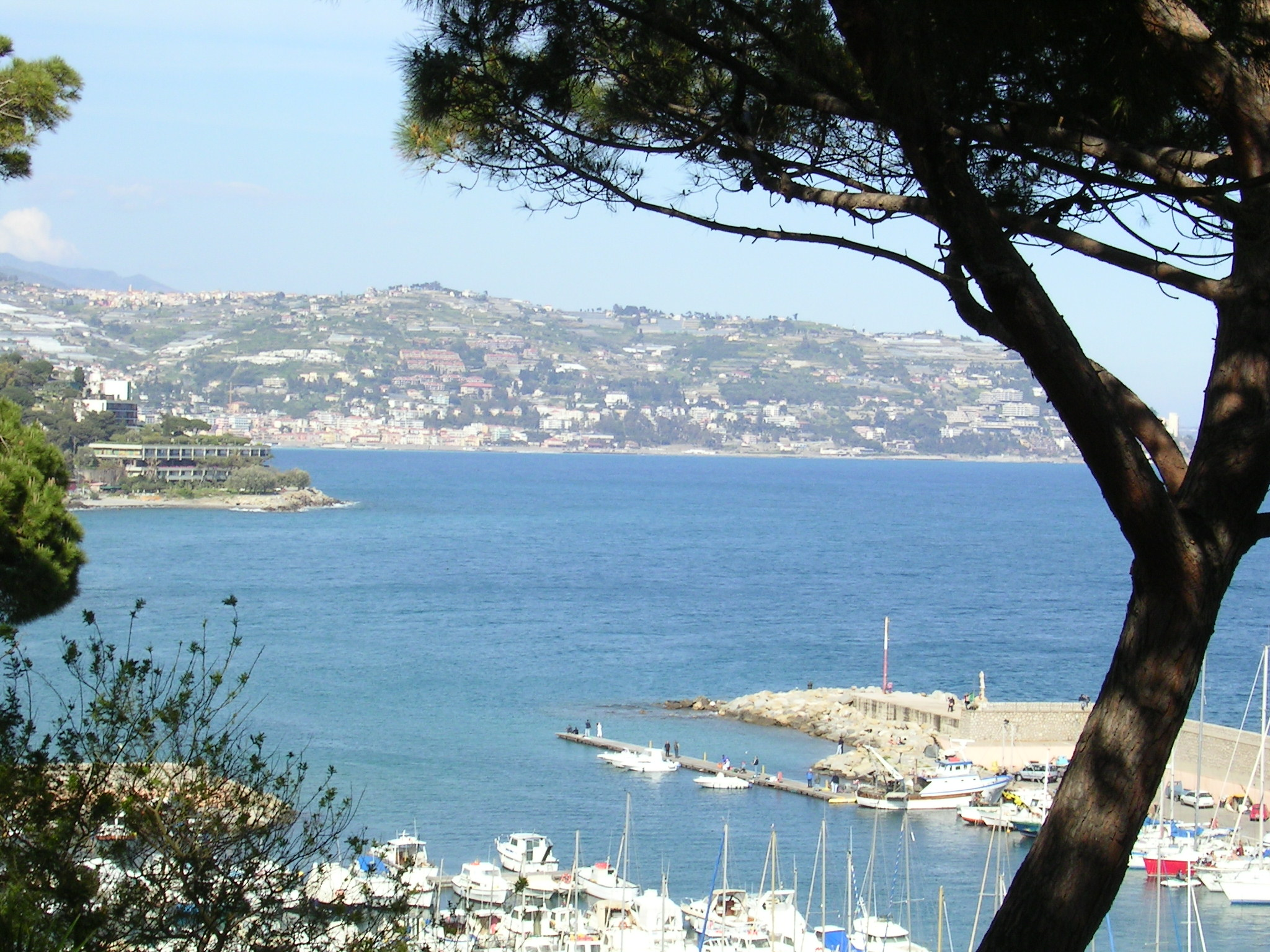 Blick zum kleinen Hafen von der Via Romana aus